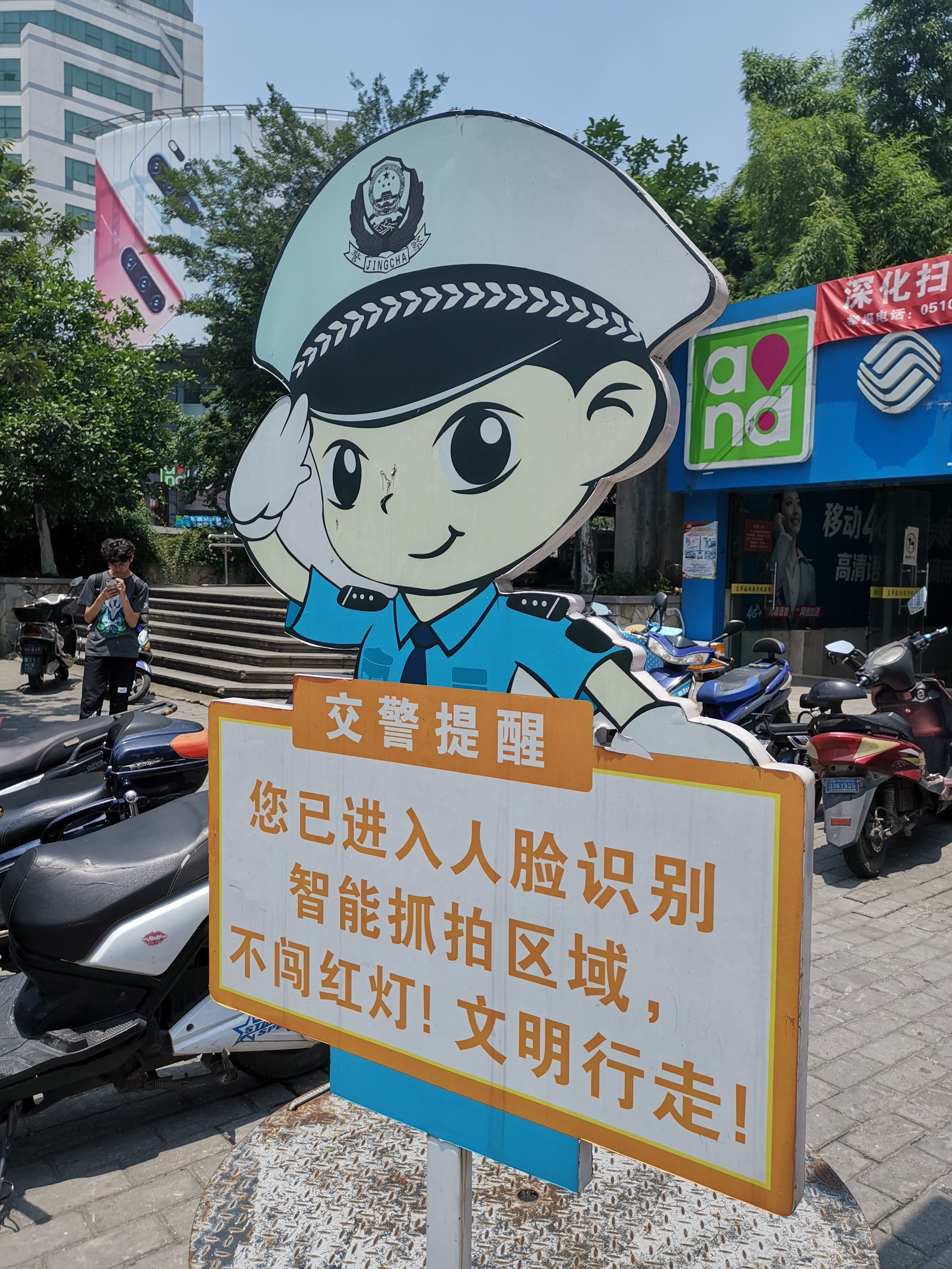 交通警察提醒牌 人脸识别